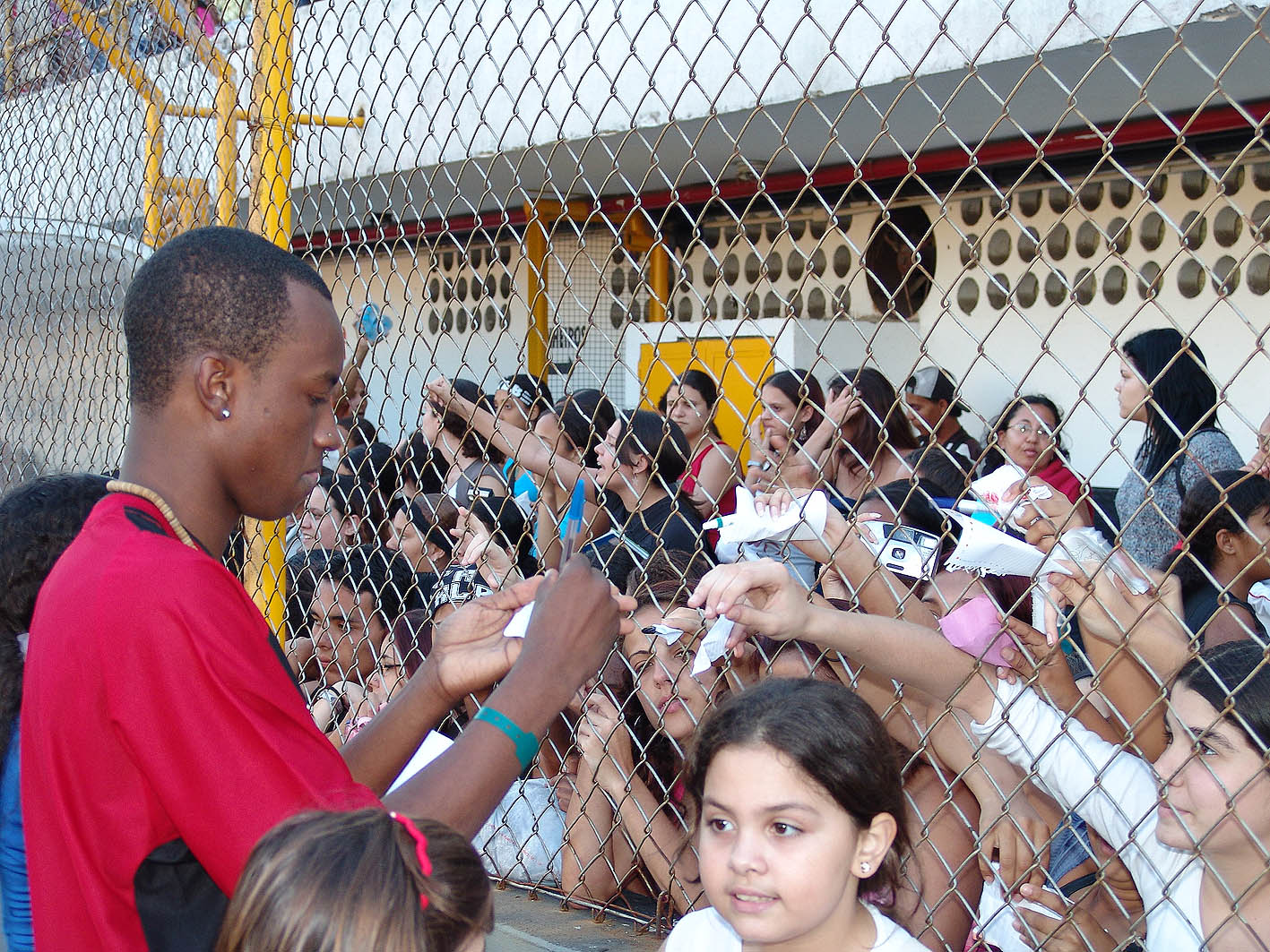 Thiaguinho em um futebol beneficente em 2003.